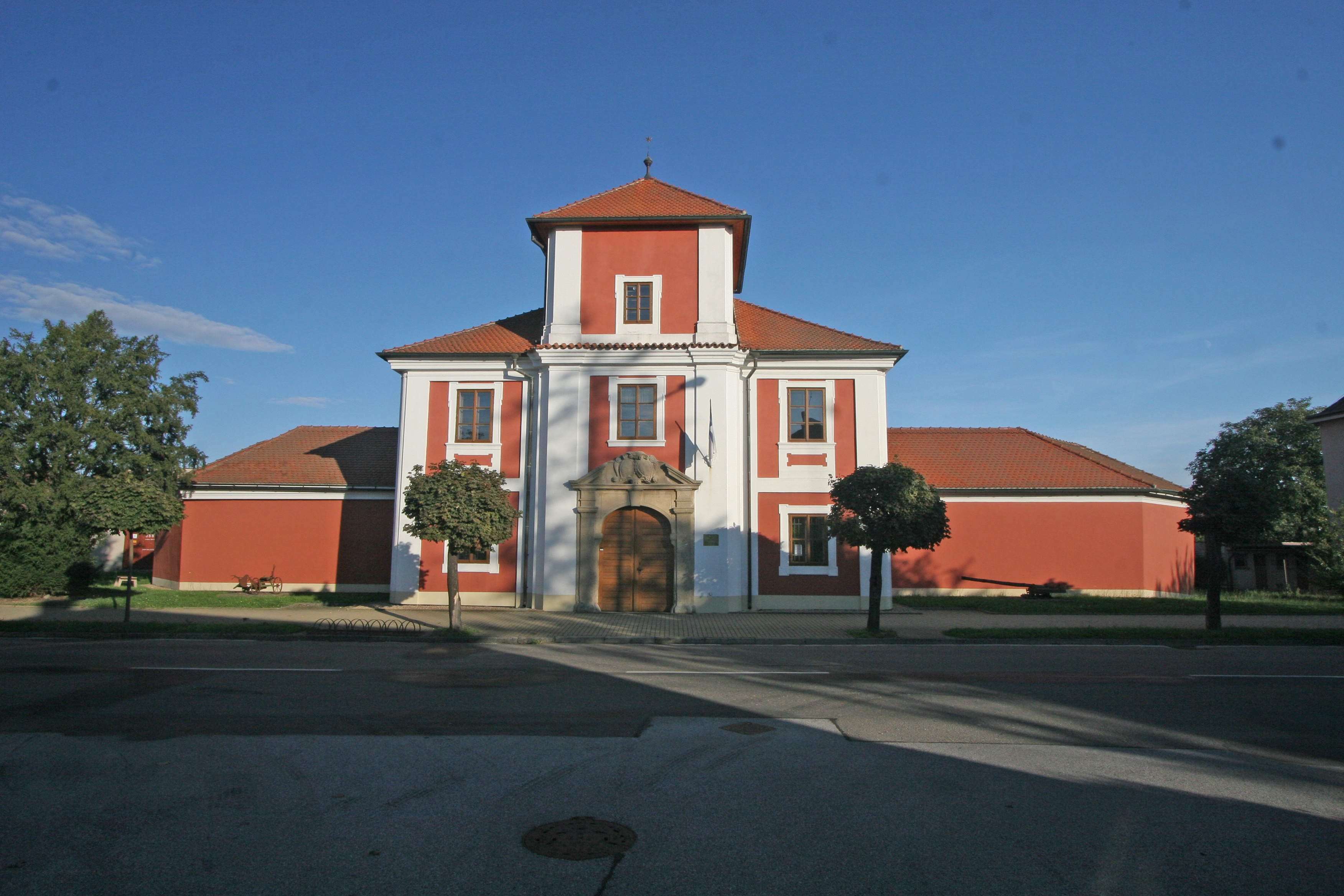 Loreta (Chlumec nad Cidlinou), Kozelkova 25, Chlumec nad Cidlinou